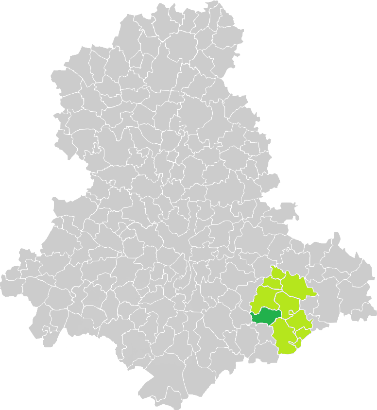 Carte de situation de la commune de Saint-Méard (en vert foncé) dans le votre Canton (en vert clair) sur une carte des communes de la Haute-Vienne